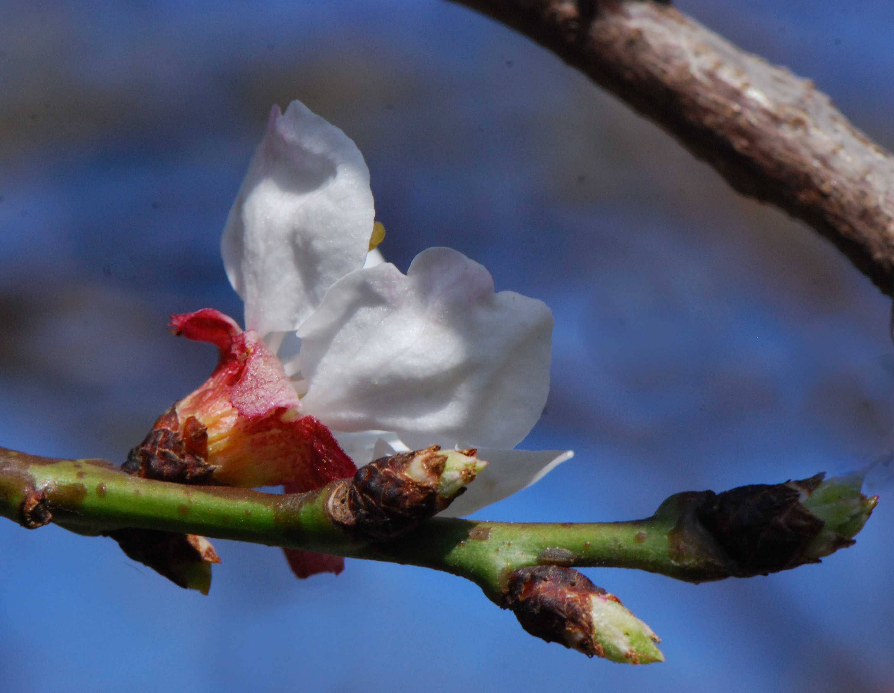 Prunus armeniaca, fleur, Jardin des Plantes de Paris